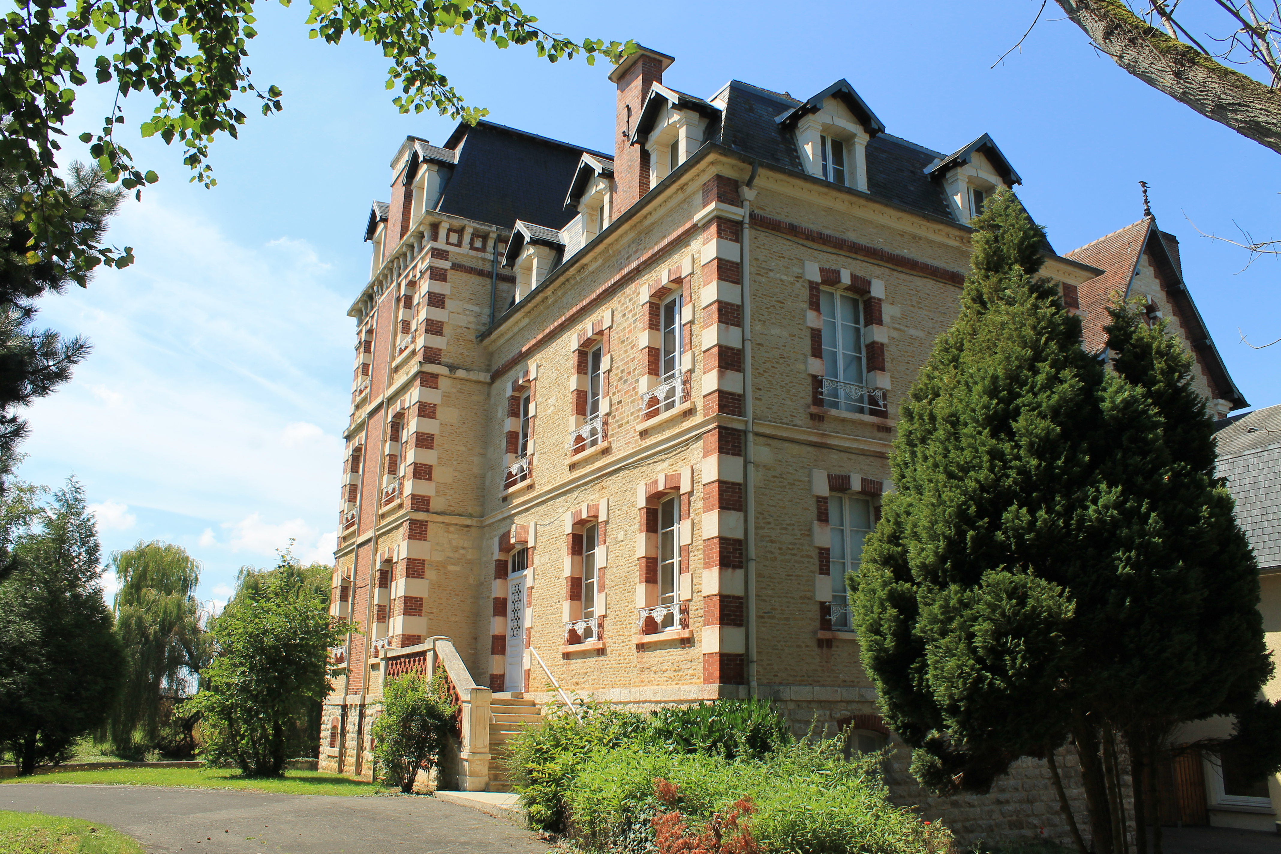 Château Saint-Pierre-Oursin (maison de convalescence) à Vimont (Calvados)